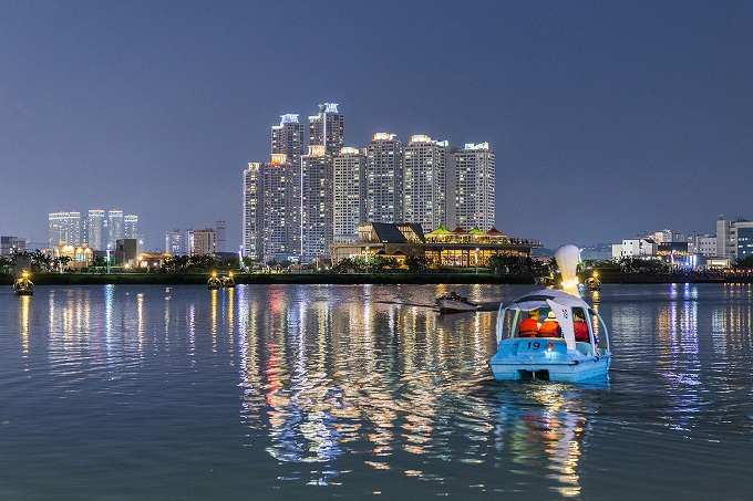 대구광역시 수성못